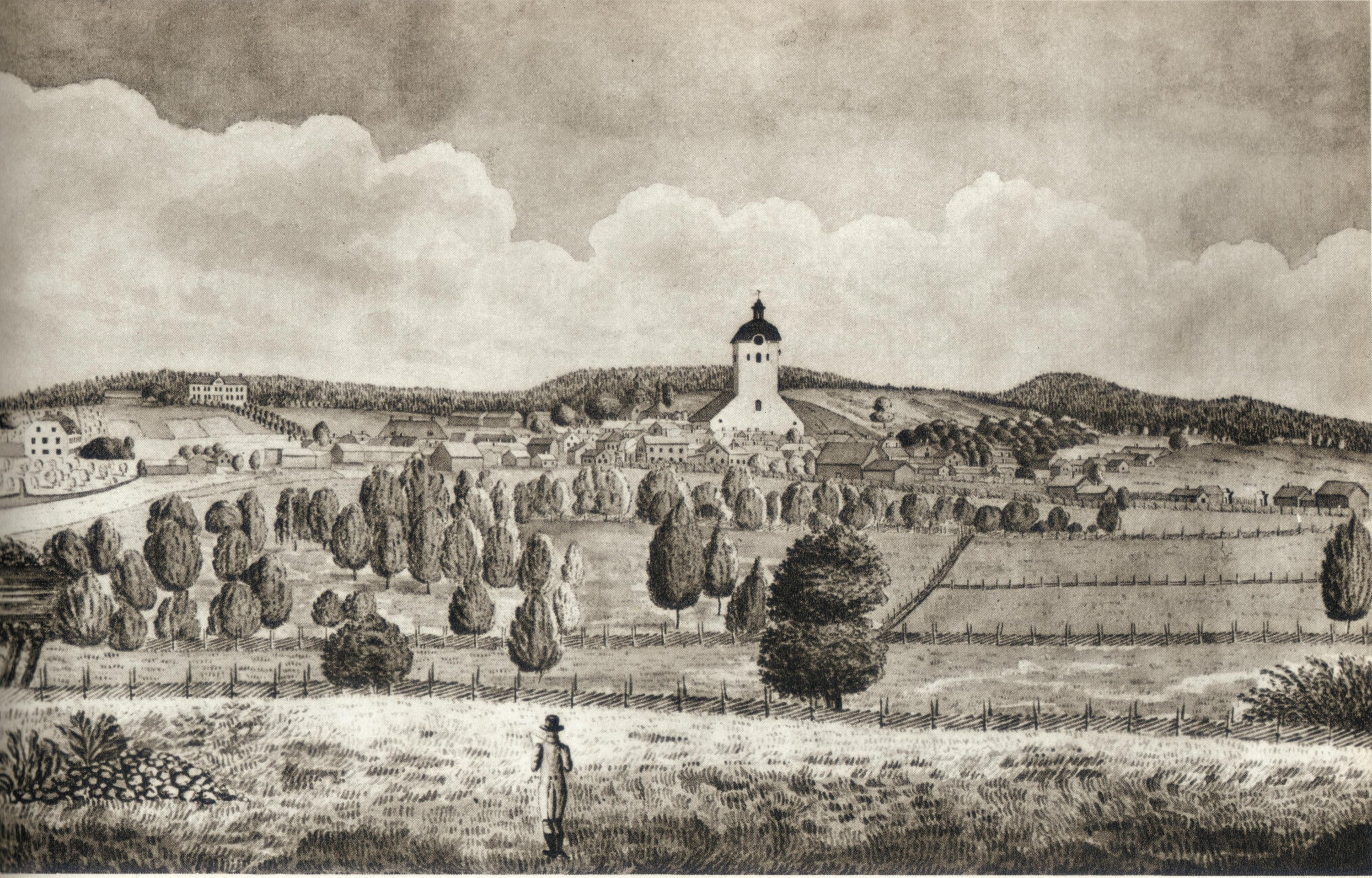 Växjö från Västramark 1802. Akvarellerad teckning av L.G. Boring 1802.